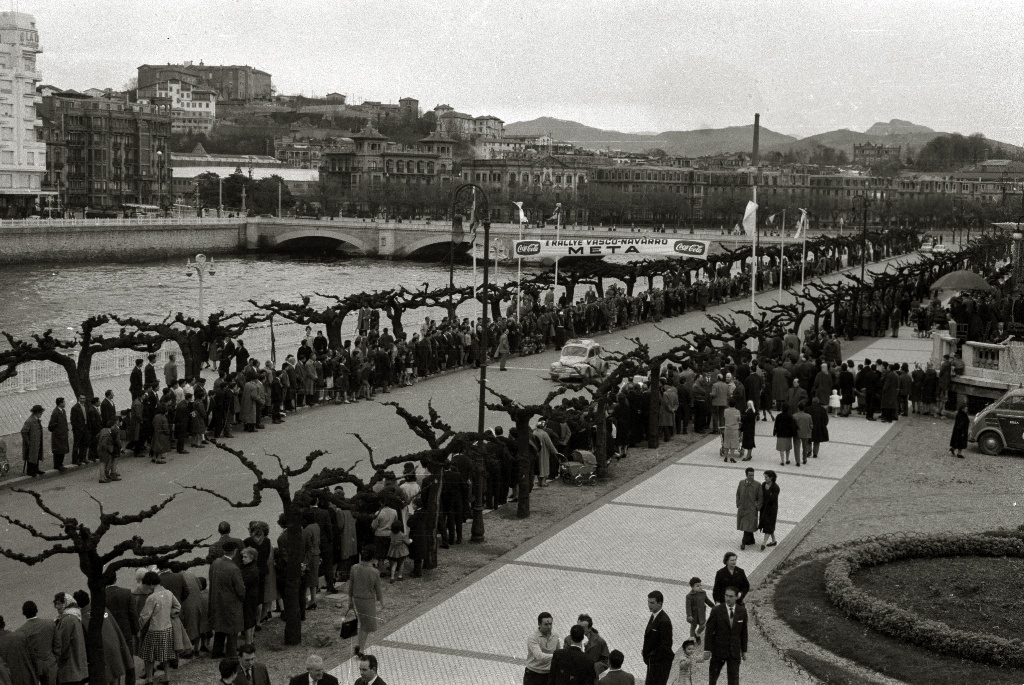 Título original: I Rally Vasco Navarro (14/30) Localización: San Sebastián (Guipúzcoa)